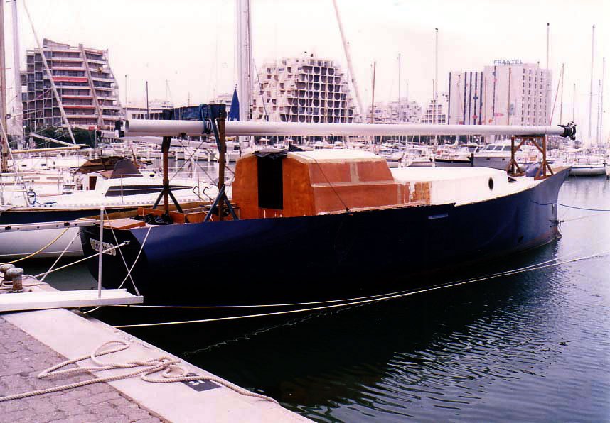 Mise à flot de la goélette. Pose des mâts sur le roof et le pont aménagés.